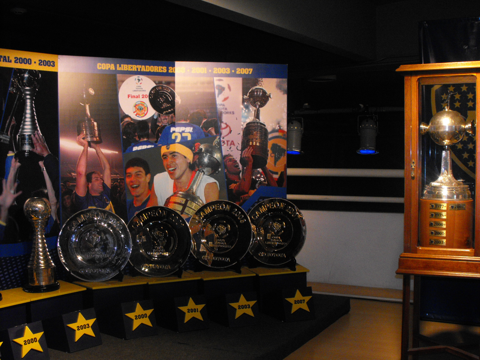 Trofeos ganados por C.A. Boca Juniors exhibidos en el museo